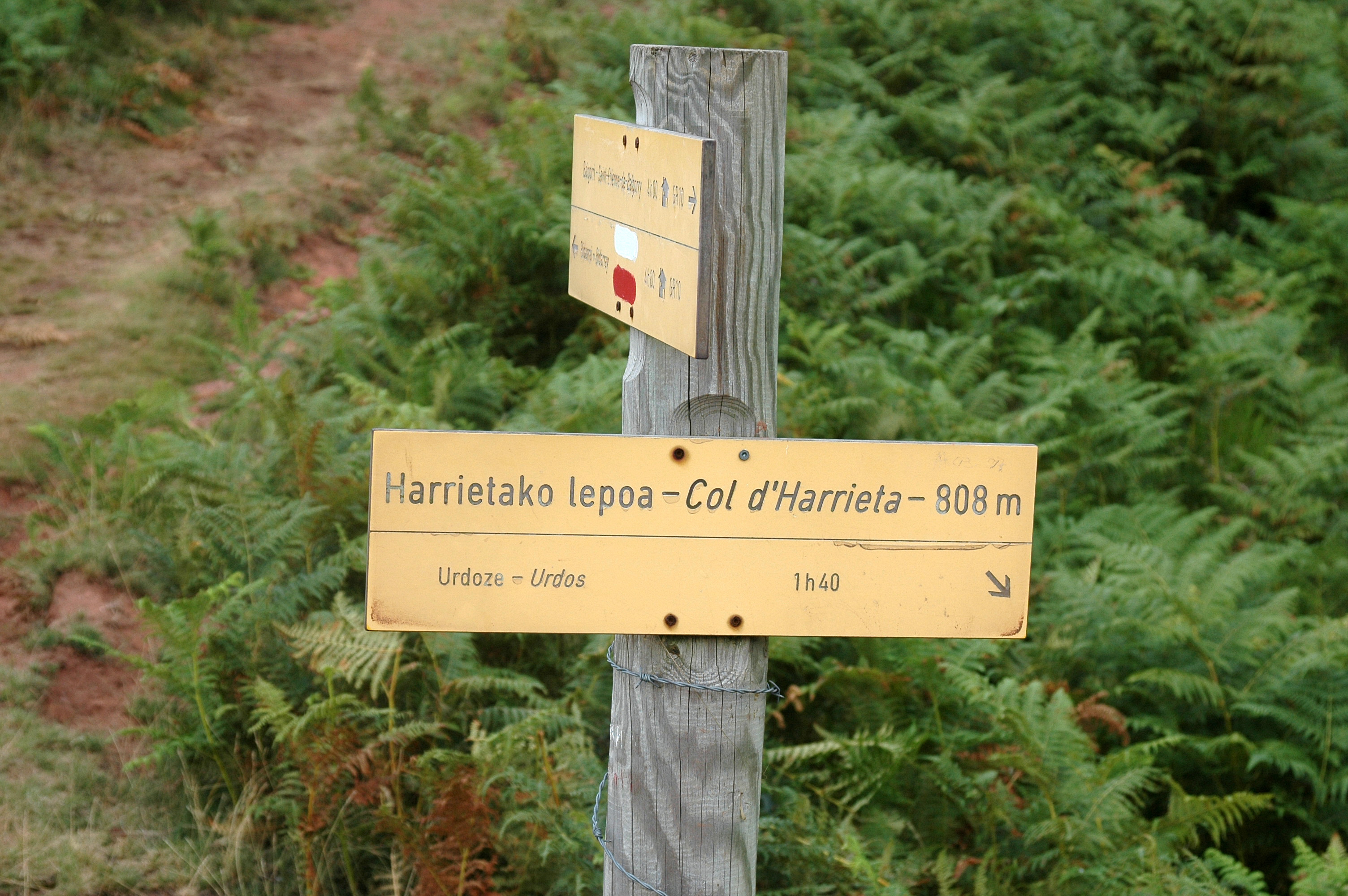 Saint-Étienne-de-Baïgorry, GR 10 au col d'Harriéta. Photo prise le 11/08/06 par Harrieta171